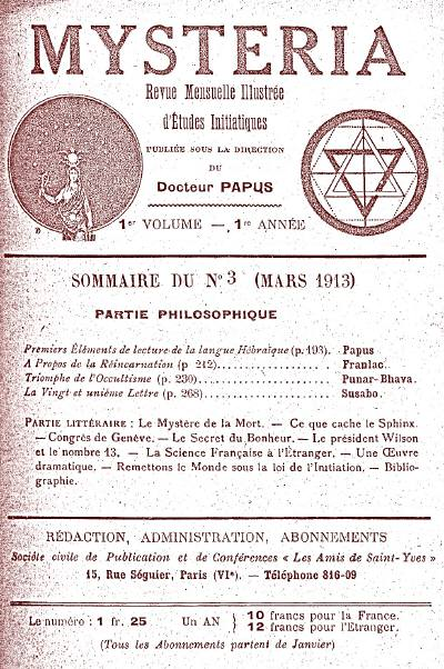 Обложка журнала №3. В оглавлении псевдонимы Папюса и Punar Bhava (Ч.Чинский)